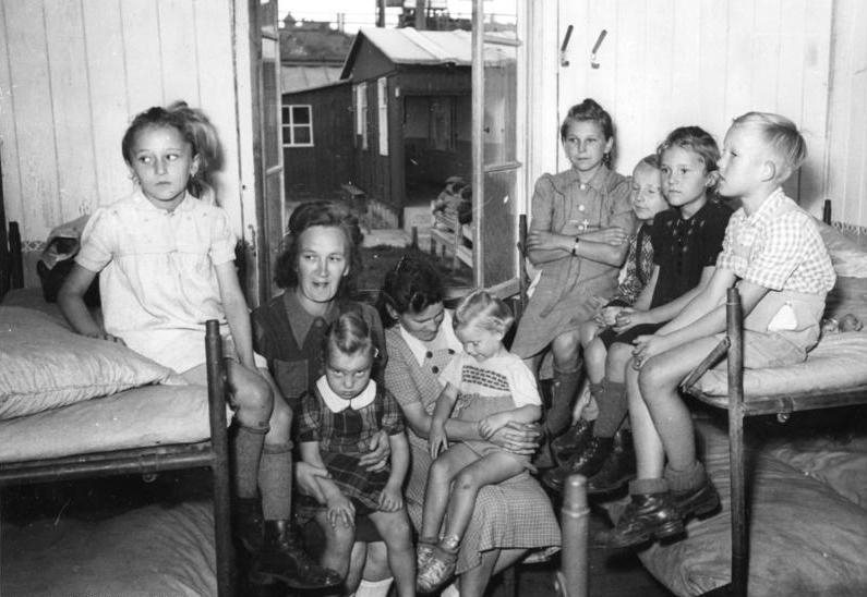 Durchgangslager Giessen Kein seltener Anblick: Familien mit fünf oder mehr Kindern wagen den Sprung aus der Sowjetzone.